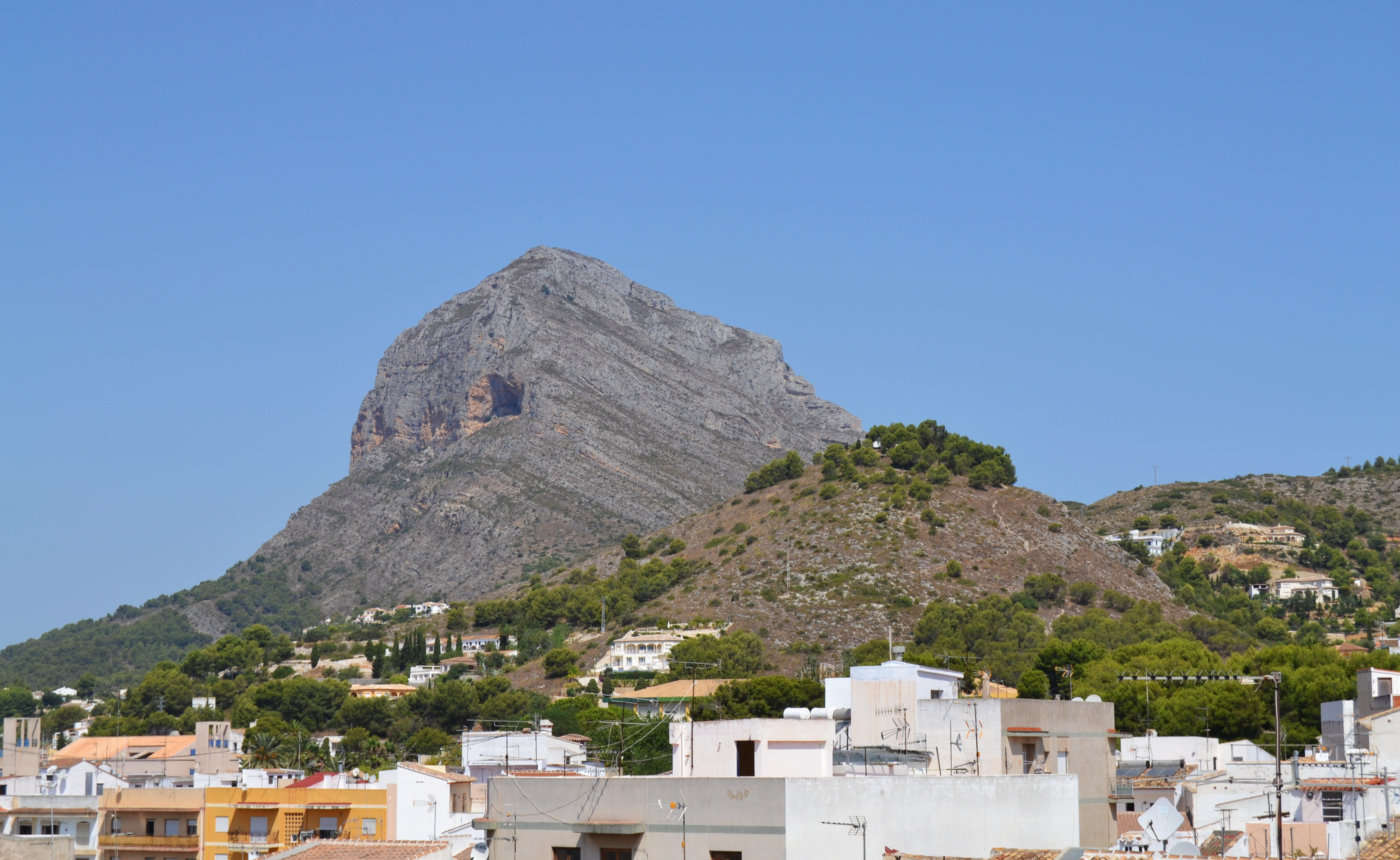 El Montgó i la muntanyeta de santa Llúcia, Xàbia.